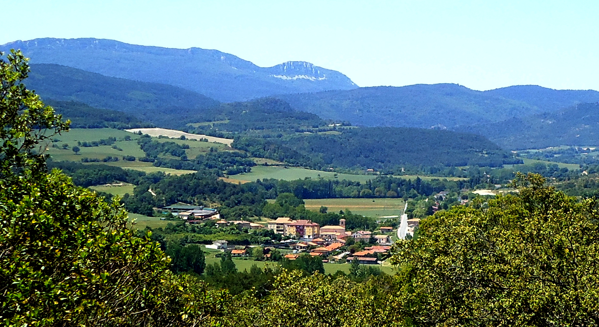 Uribarri Gaubea